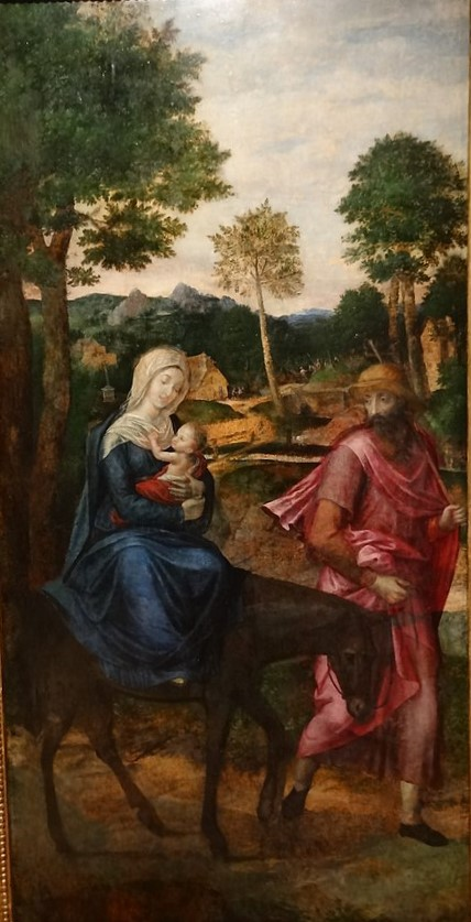 Fuga para o Egipto, pintura a óleo sobre madeira de 1581 de Michiel Coxcie,assinada e datada, que se encontra na Catedral do Funchal